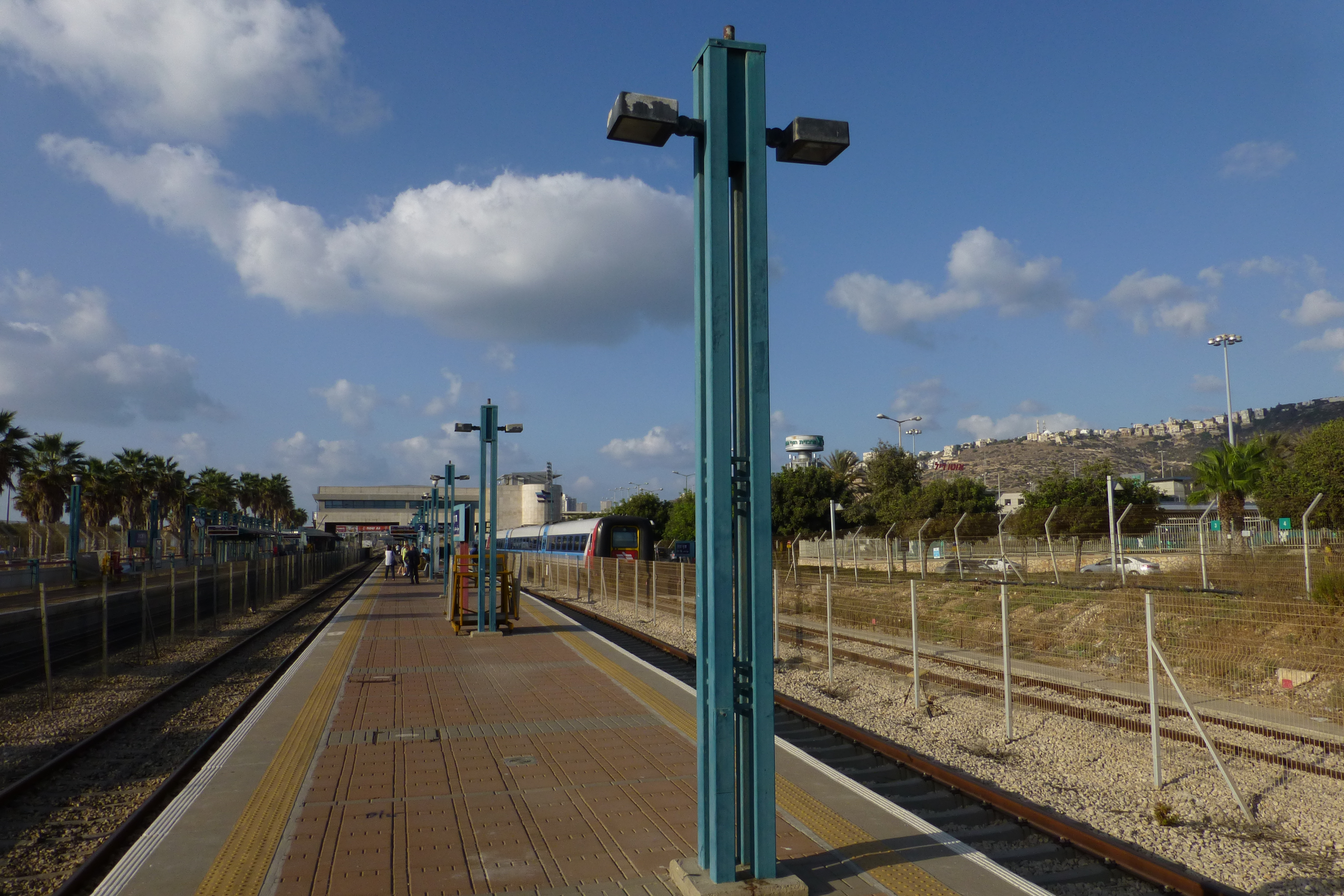 מסגד סיידנא מחמוד בשכונת כבביר בחיפה. מסגד זה משתייך לפלג האחמדים שנוסד בהודו ומטיף לנאורות, שלום ואהבה לאחר.